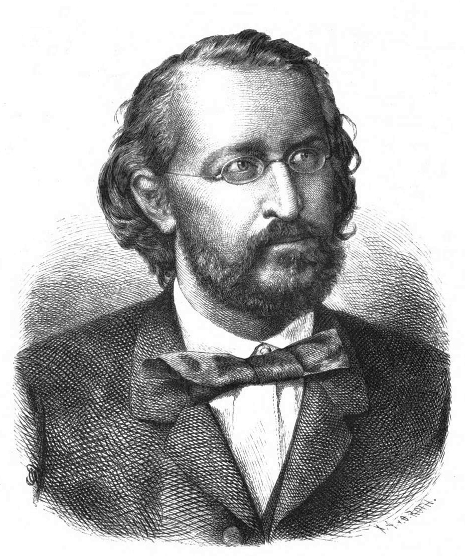 Anton Friedrich Freiherr von Tröltsch (1829-1890), German physician